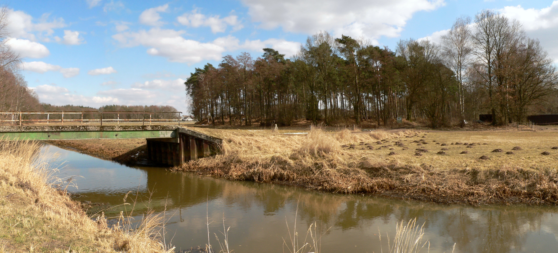 Sassenburg